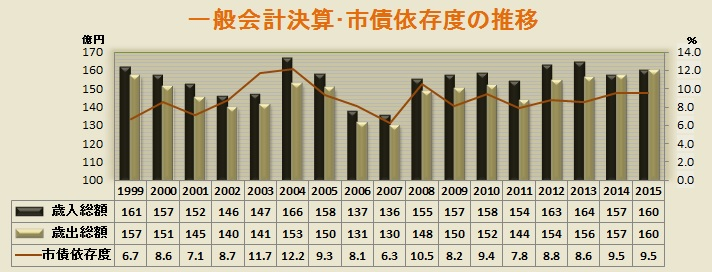 1999年以降における見附市の一般会計決算(2014･2015年は予算)･市依存度の推移